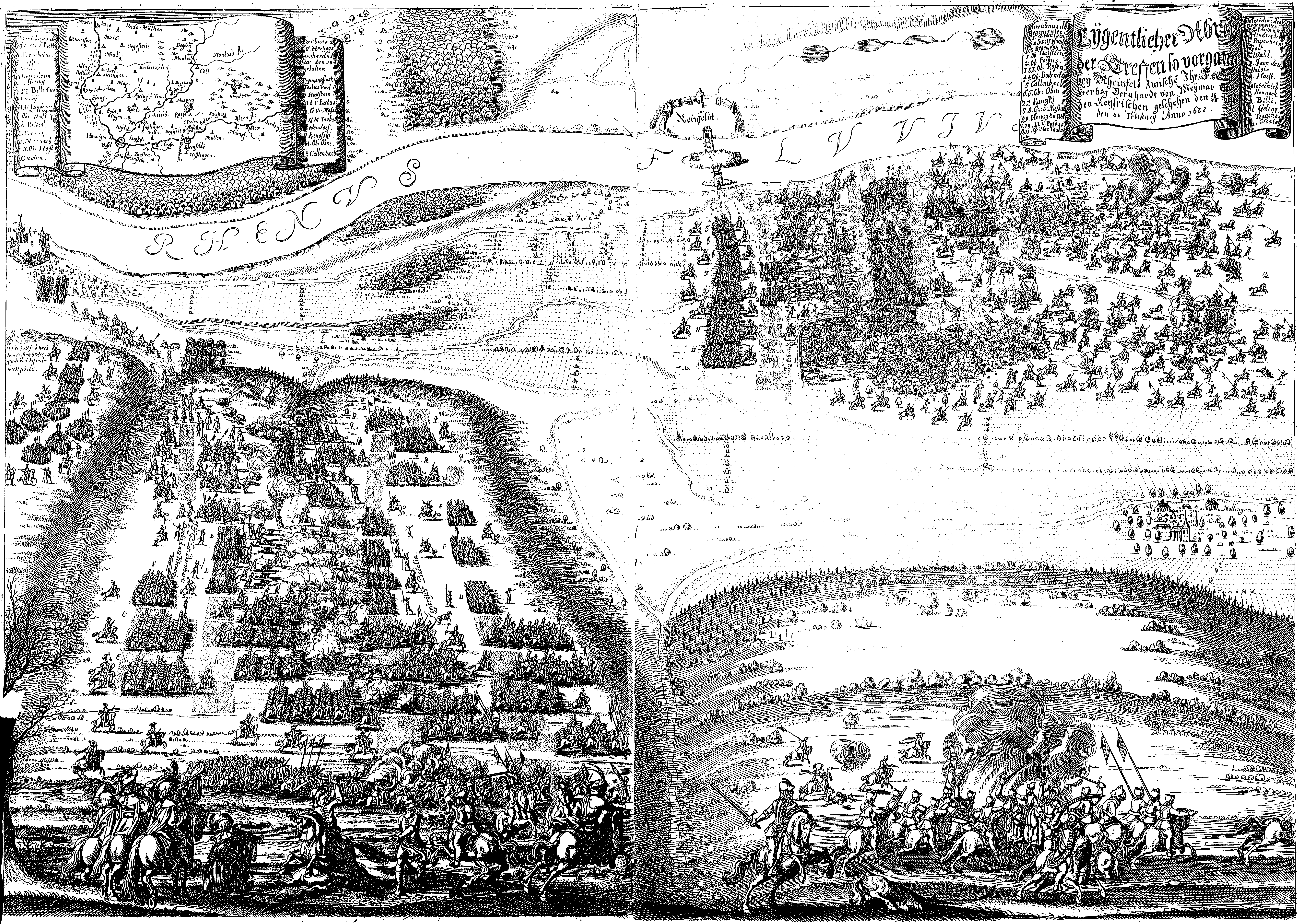 «Eygentlicher Abriß der Treffen so vorgang bey Rheinfeld zwischen Ihr F. Gn. Herzog Bernhardt von Weymar und den Keyserischen geschehen den 18./28. bis dem 21. February Anno 1638.» (Schlacht bei Rheinfelden), Kupferstich von Matthäus Merian. In: Heinrich Oraeus: Theatri Europaei Continuatio III (Theatrum Europaeum, Bd. 3, Tafel 30), 1670